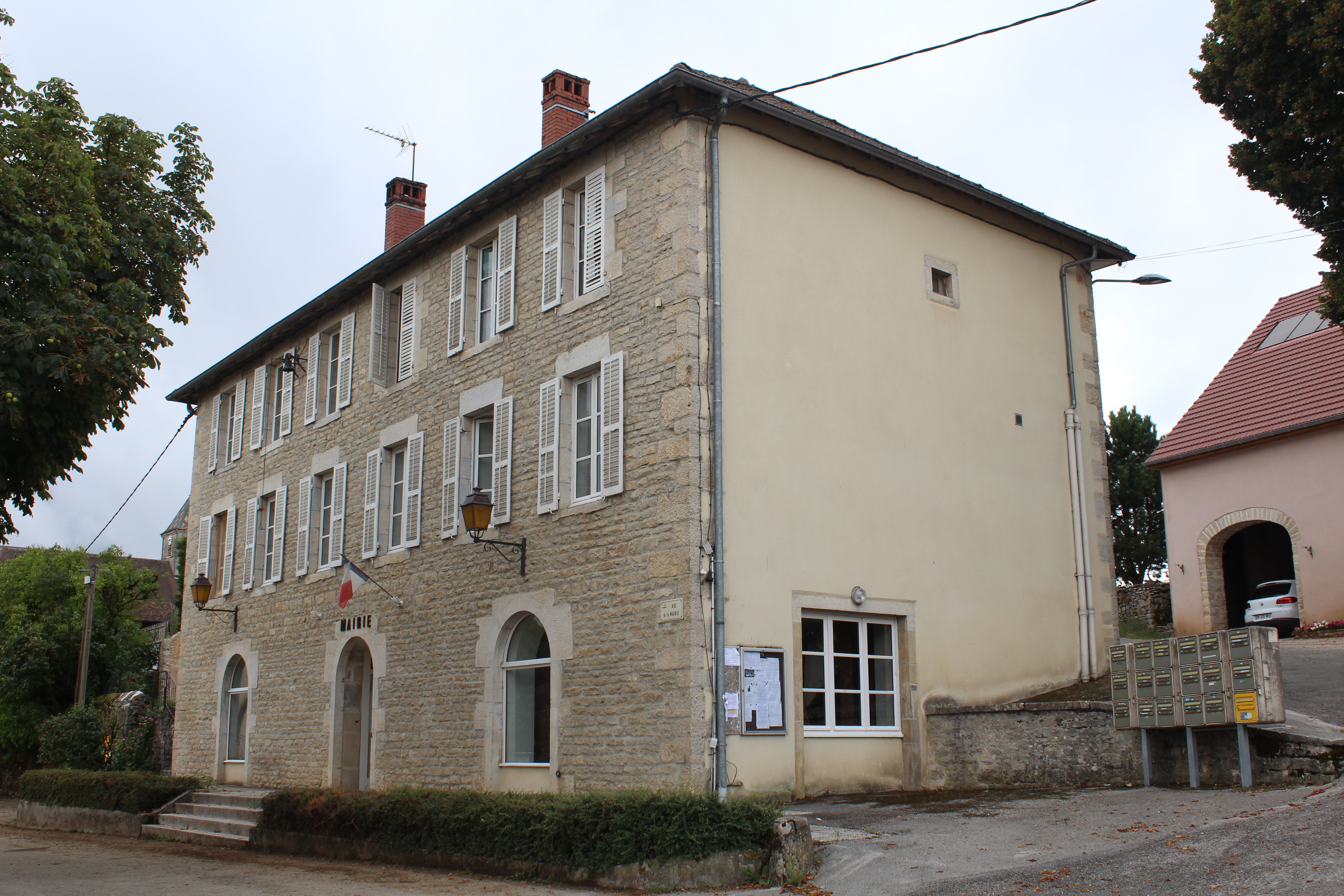 Mairie du Fied.